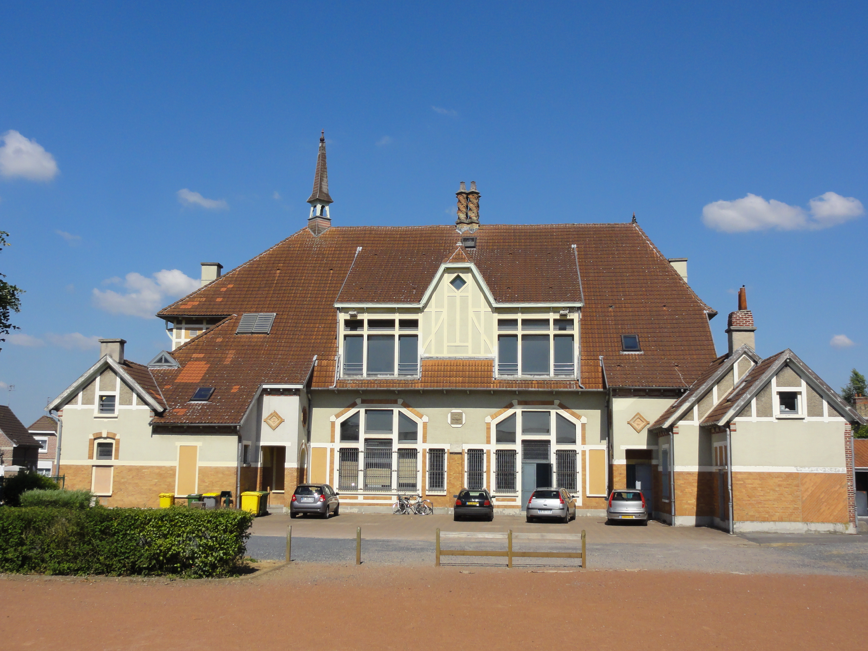 Cités de la Fosse Notre Dame de la Compagnie des mines d'Aniche, Waziers, Nord, Nord-Pas-de-Calais, France.